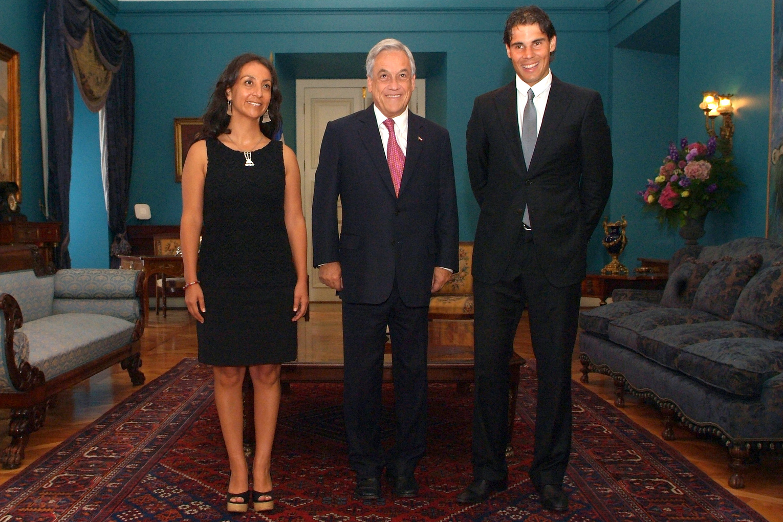 Rafael Nadal au palais présidentiel chilien de La Moneda en février 2013.